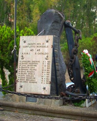 Monumento ai Marinai (città di San Cataldo, provincia Caltanissetta)(1).jpg